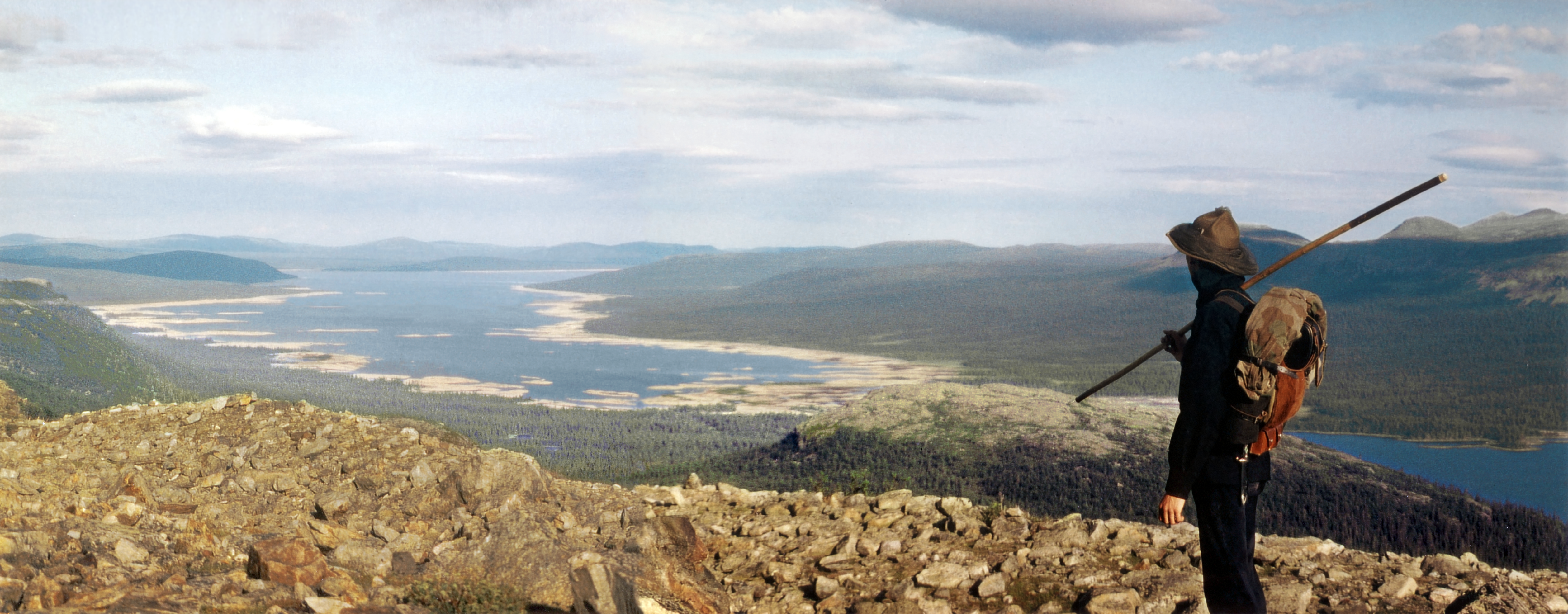 Nordlandfahrt des Pfadfinderstammes Ägypten (Trupp Penzberg) vom 29.07. bis 21.08.1994 nach Schweden und Norwegen. Ausgangspunkt dieser Erkundung entlang des Kungsleden war am 2. August 1994 die Fjällstation Kvikkjokk. Von dort ging es rund 17 Kilometer zur Fjällstation Pårte Fjällstuga am Sjaptjakjaure und anschließend zehn Kilometer weiter zum Tjaktjajaure mit einer Übernachtung in der Rittak-Schutzhütte. Auf der letzten Etappe wurde über die Hochebene Favnoajvve Richtung Aktse marschiert. Die Wanderung mußte anschließend abgebrochen werden, da ein erwachsener Teilnehmer, der sich mit der Teilnahme überfordert hatte, erkrankte. Das Moskitonetz auf dem Pfadfinderhut ist ein unabdingbares Accessoire in den nordschwedischen Sümpfen.